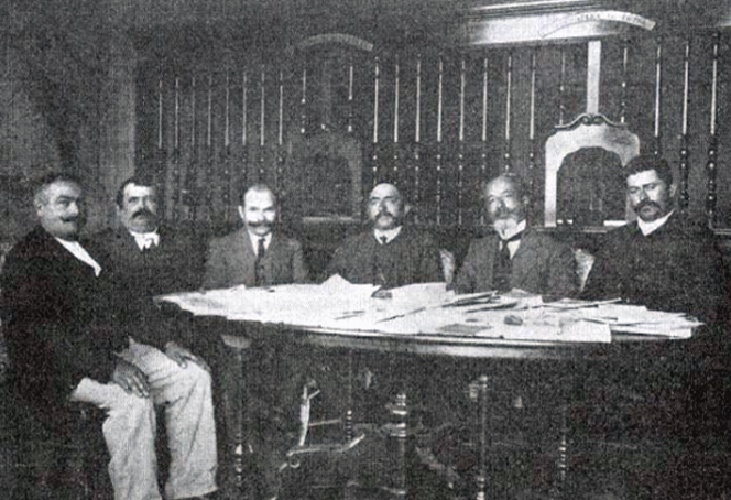 Diretoria da primeira Cooperativa de Caxias. Da esquerda para a direita: Demétrio Molon (de Otávio Rocha), ... Stallivieri, Paulo Rossato, Mario Pezzi, Stefano Paternó e Jacinto Adamatti.